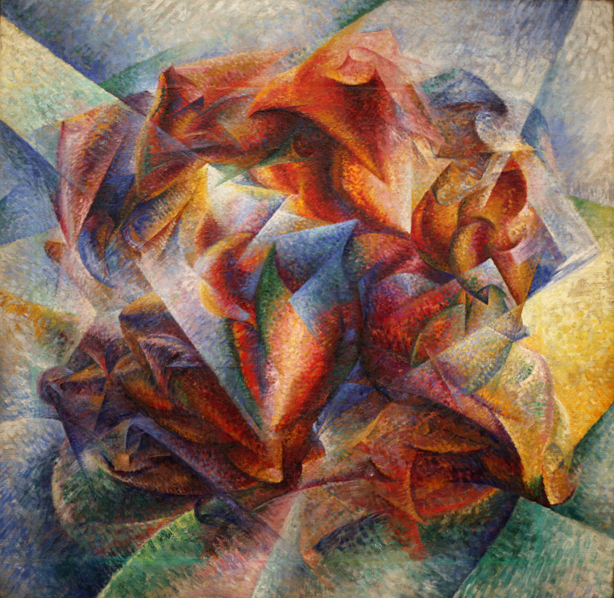 Opera di Umberto Boccioni (1913)